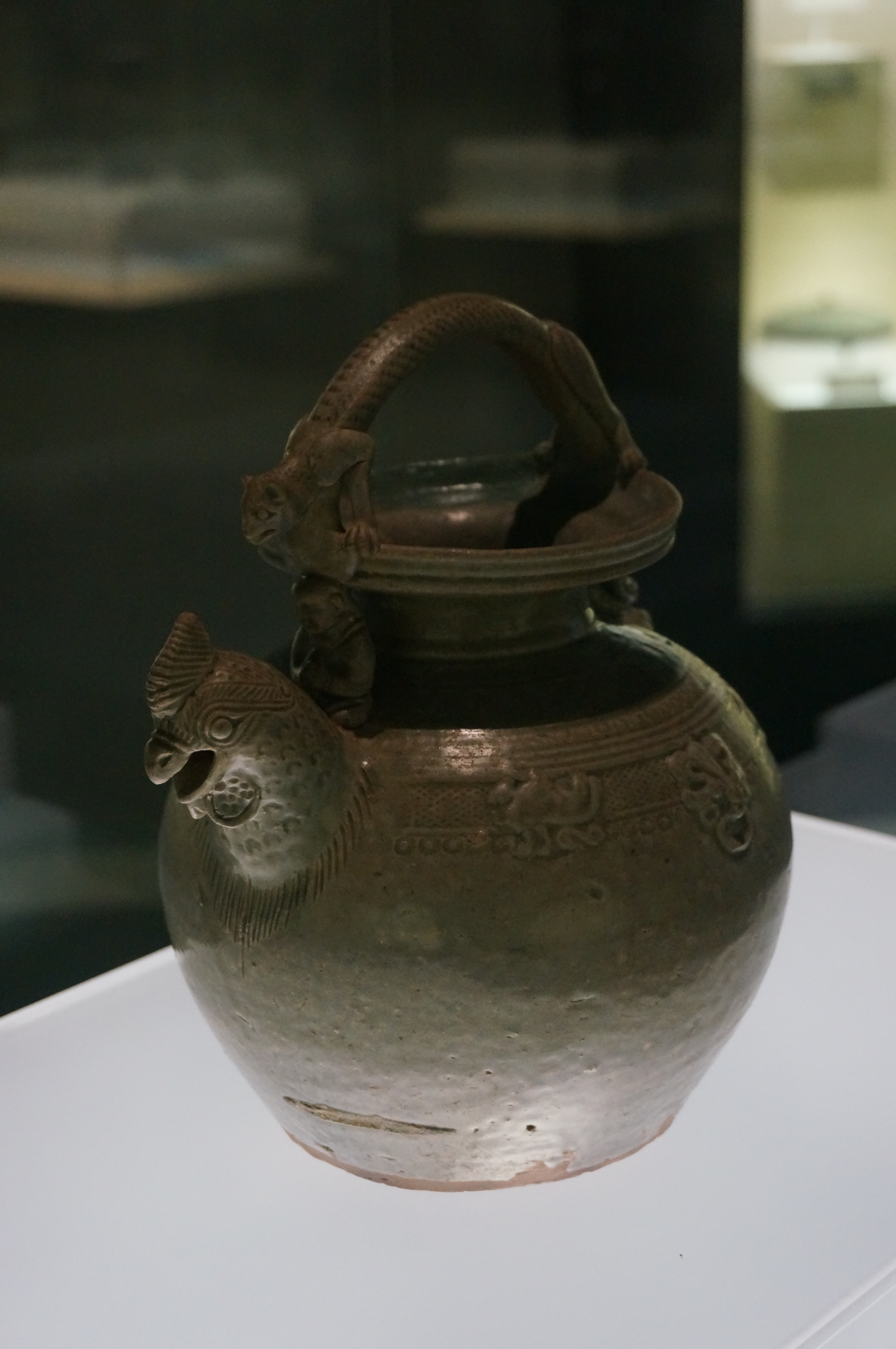 西晋青瓷蜥蜴把鸡首壶，余姚肖东五金墩出土。